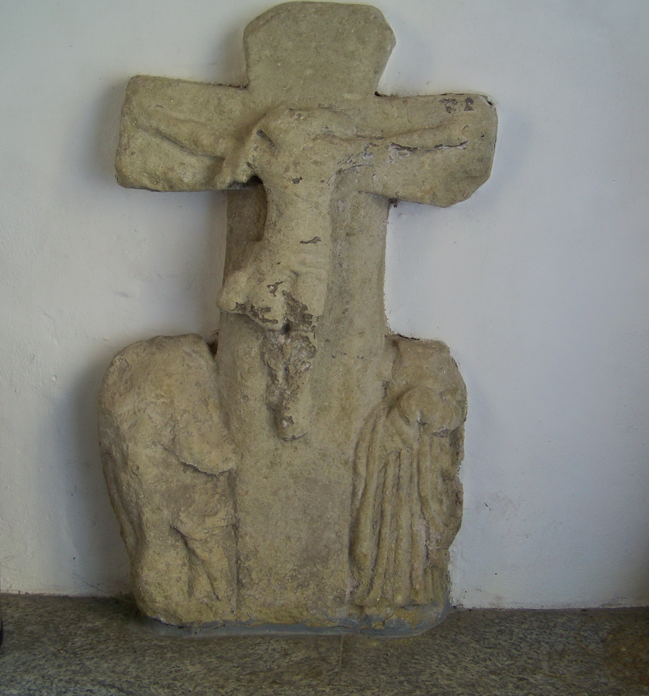 Mintraching, Mangolding, Kirchstraße 3. Verwittertes Steinkreuz in der Vorhalle der Kirche St. Peter und Paul mit Kreuzigungsgruppe aus dem 16. Jh.